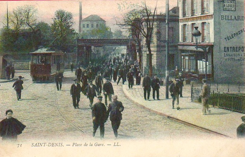 Saint-Denis, place de la Gare, carte postale ancienne exempte de droit d'auteur.